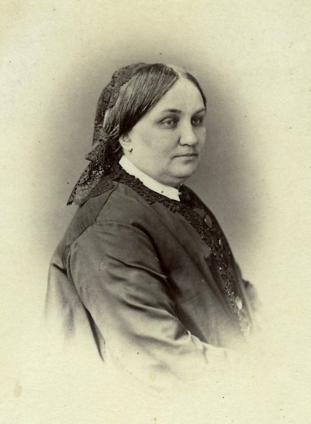 Екатерина Александровна Языкова, ур. Белавина (1820—1896)